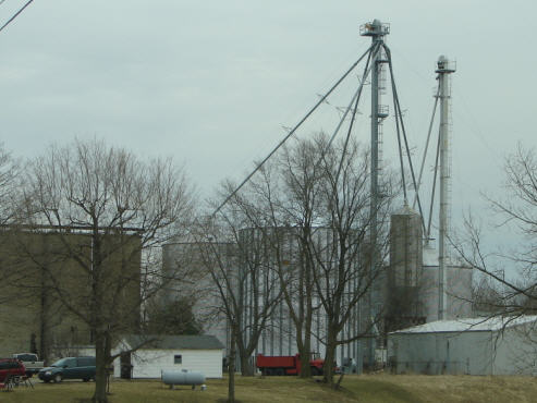 Darlington, Indiana